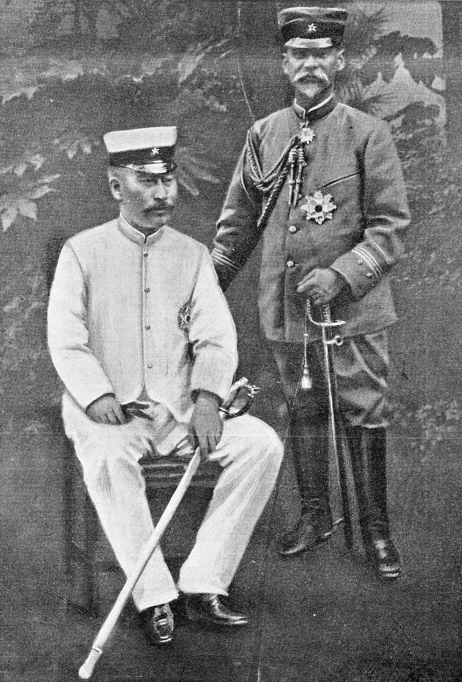 see picture